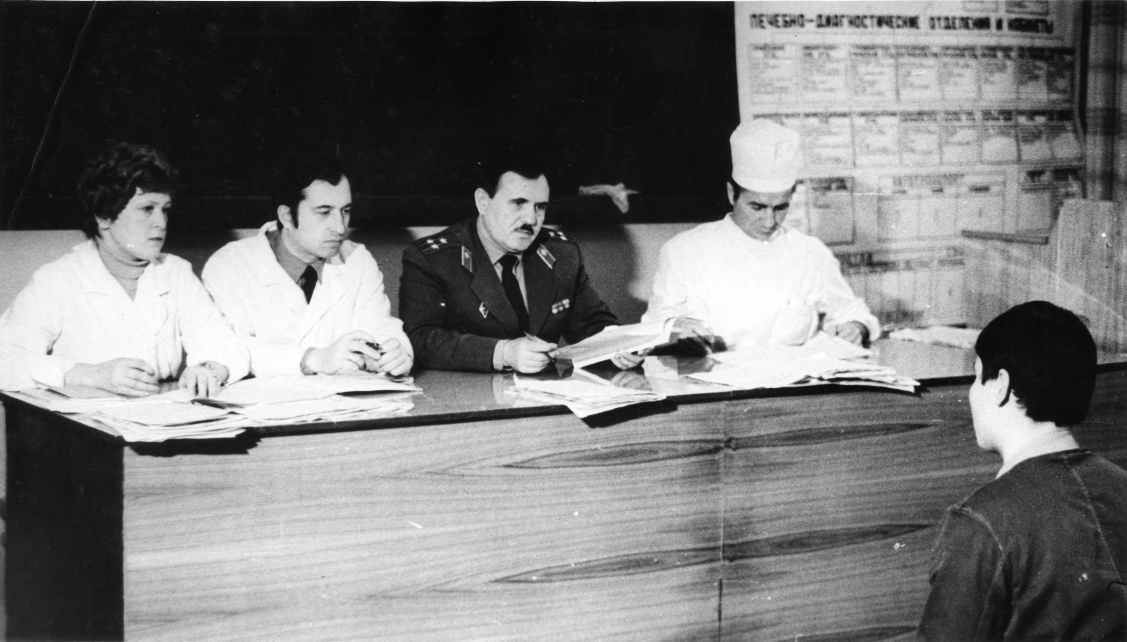 Заседание ВВК ( 80-е года 20 века )